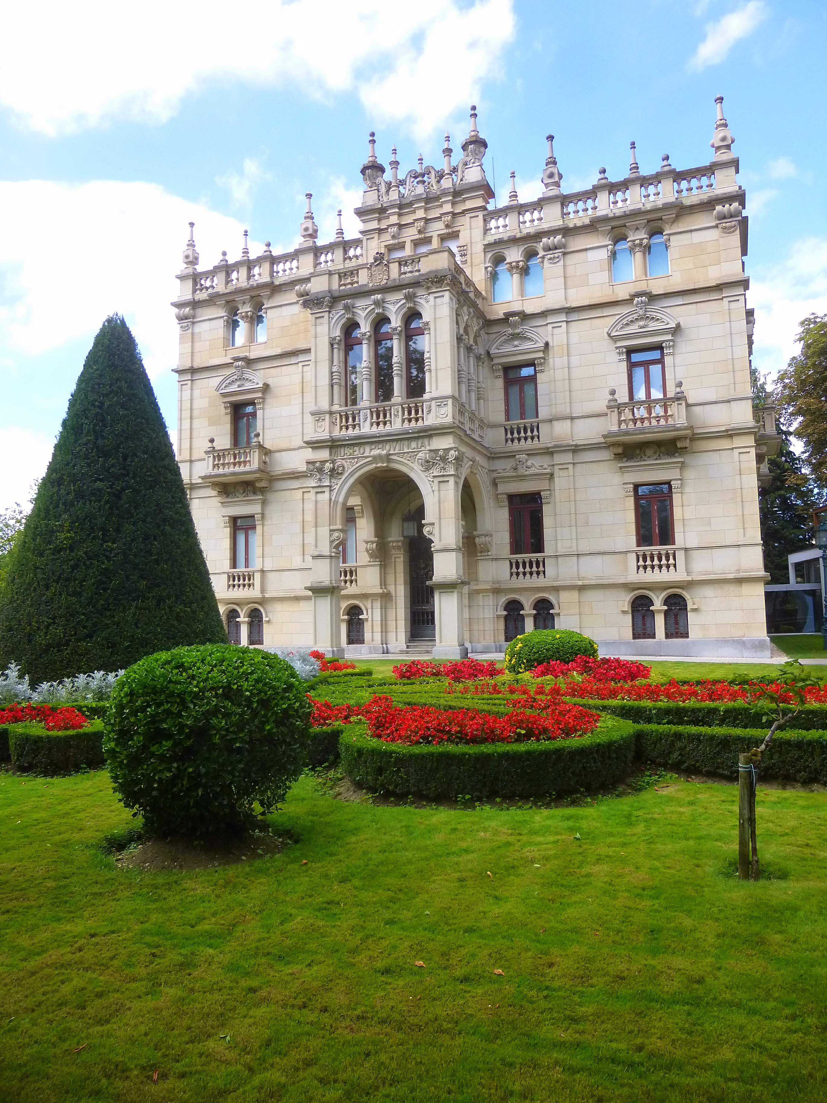 Museo de Bellas Artes de Álava (Vitoria)